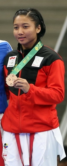 طراوت خاکسار در مسابقات کاراته بازی‌های کشورهای اسلامی2017/باکو